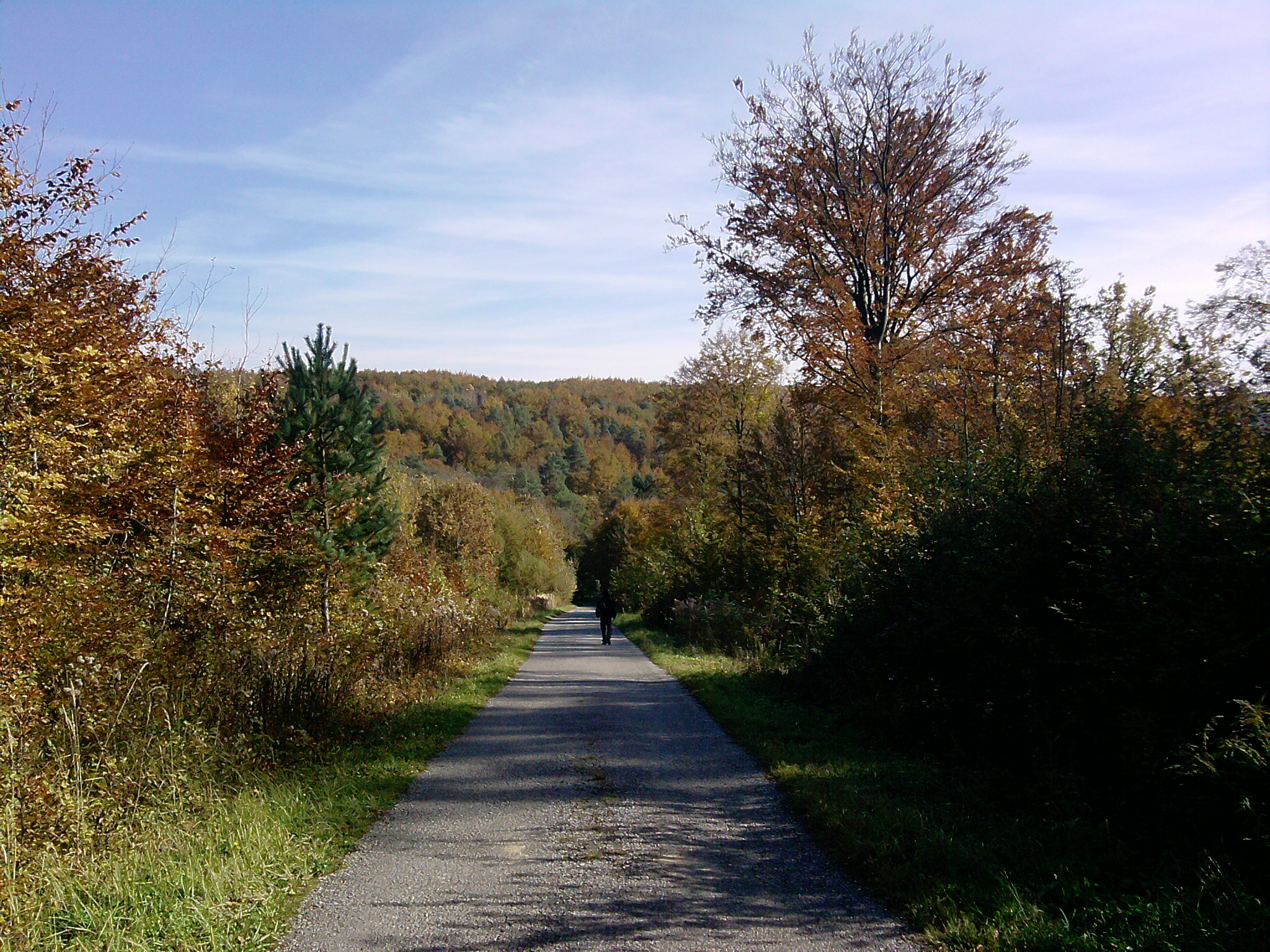 Prešov - Cemjata